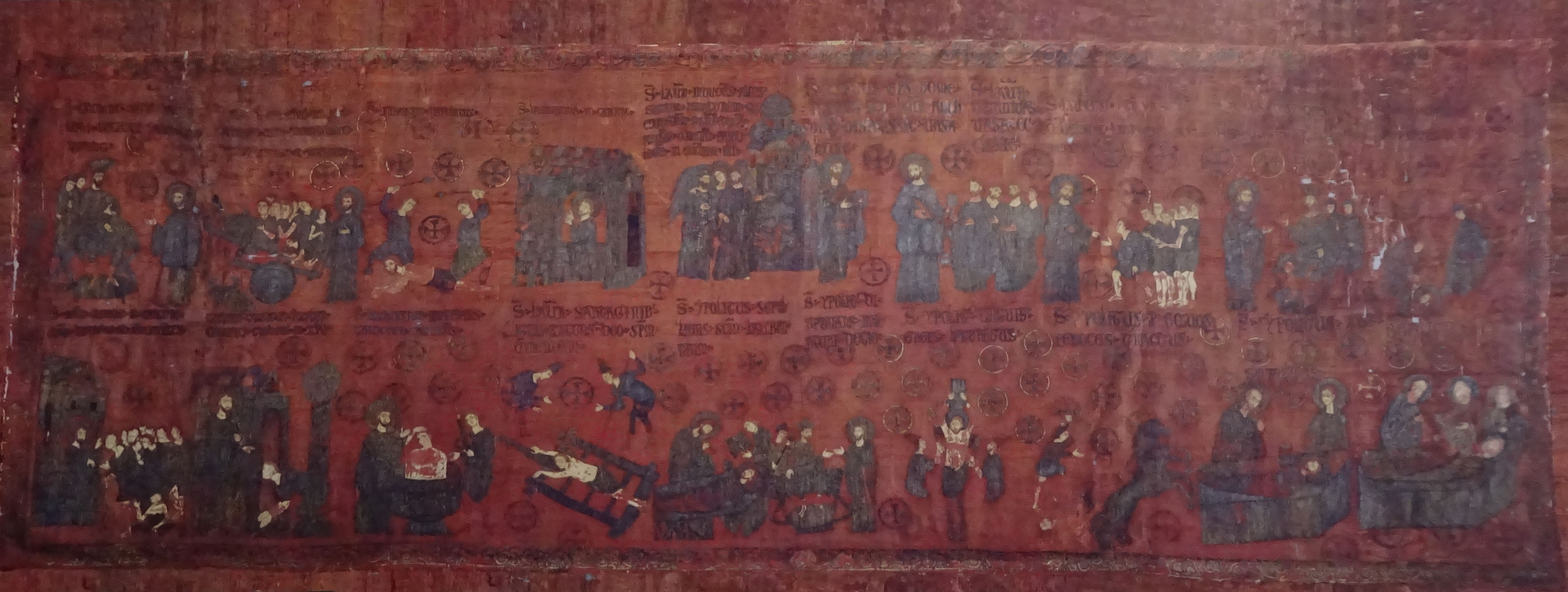 Chiostri e museo di Sant'Agostino - Riproduzione del Pallio di San Lorenzo This is a photo of a monument which is part of cultural heritage of Italy.